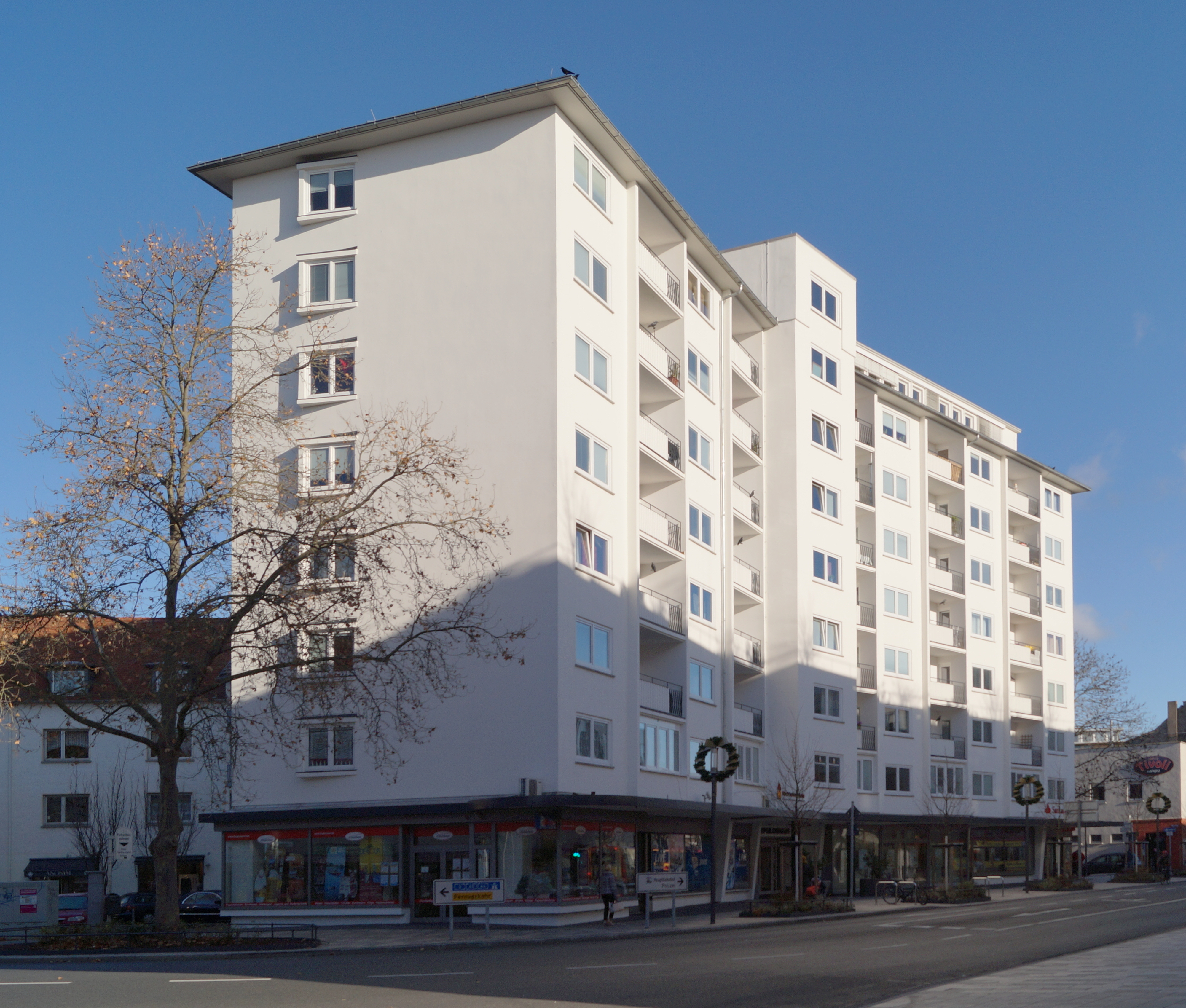 Aufgrund seines Grundrisses sogenanntes Ypsilon-Haus am Freiheitsplatz in Hanau